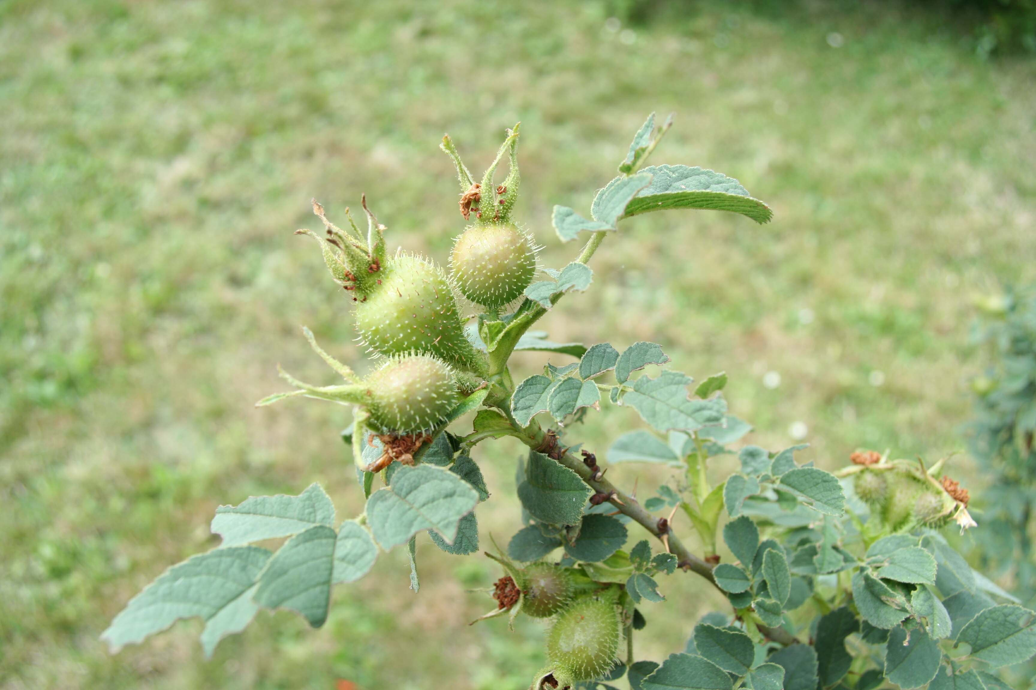 Rosa villosa, roseraie de paysage de Bagatelle - Paris (France)